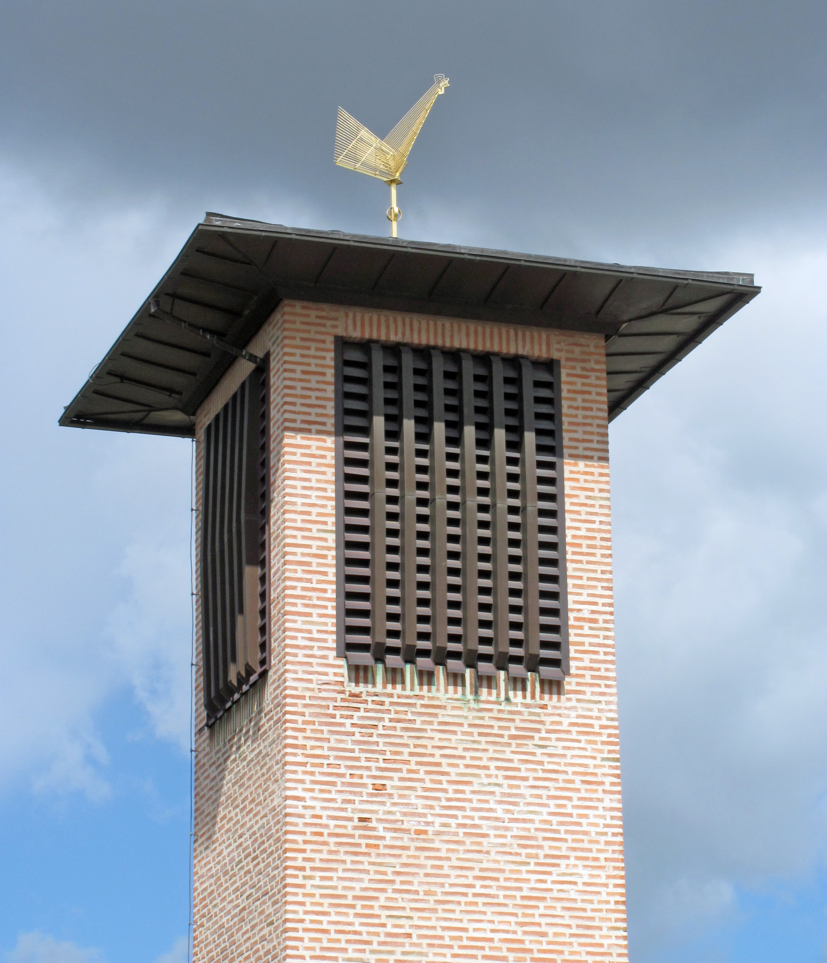 Sankt Andreas kyrka, Eskilstuna, klockstapel.